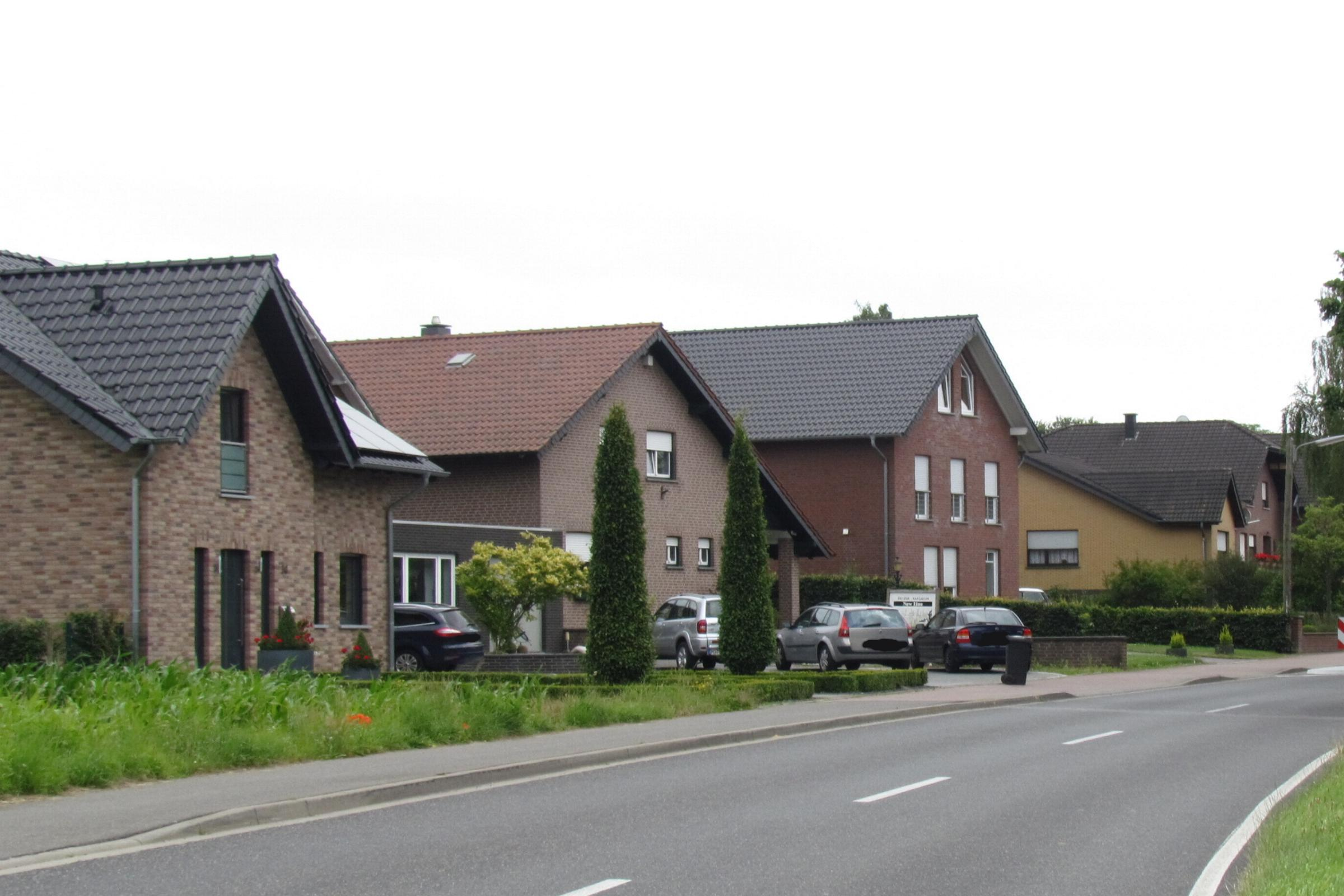 Stein Ortseingang